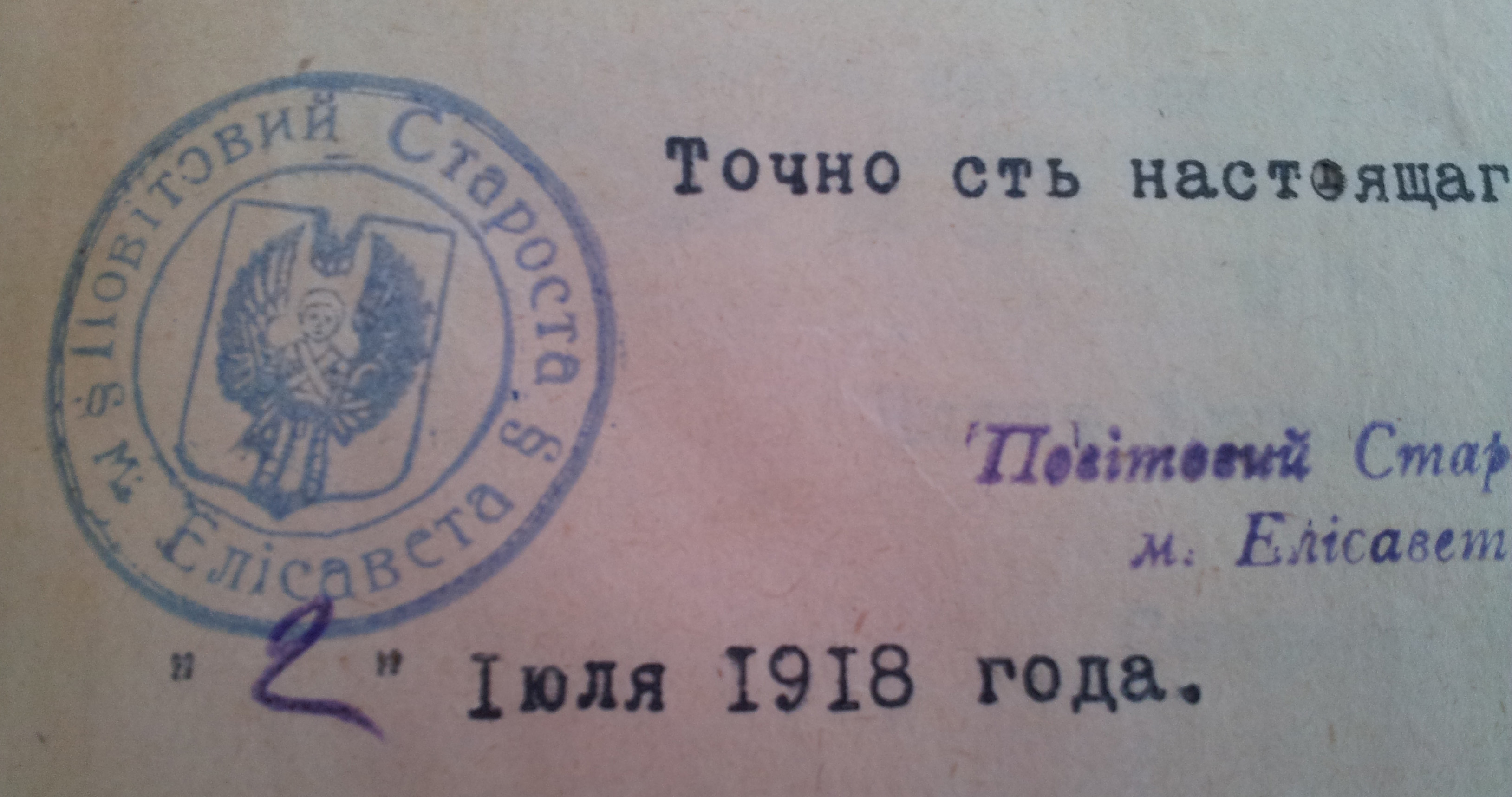 Печатка на документі 1918 року представника центральної влади (УНР та УД) повітового старости міста Єлисавета (тепер Кіровоград)